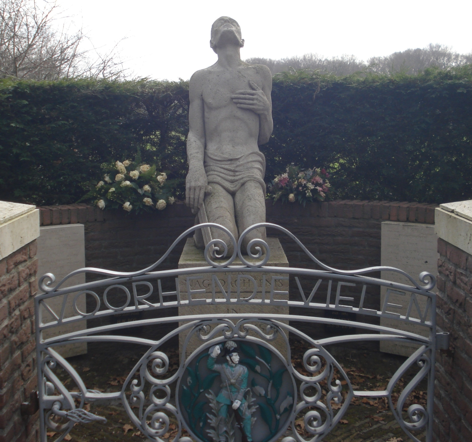 Wassenaar, Schouwweg tegenover 75 / WAVO-park. Oorlogsmonument "Voor hen die vielen" van Joop M. Veldheer. The Netherlands. The photographical reproduction of this work is covered under the article 18 of the Dutch copyright law, which states that “it is not an infringement of copyright to reproduce and publish pictures of a work, as meant in article 10, first paragraph, under 6°[1] or of an architectural work as meant in article 10, first paragraph, under 8°[2], which are made to be permanently located in a public place, as long as the work is depicted as it is located in the public space. Where incorporation of a work in a compilation is concerned, not more than a few of the works of the same author may be included”. [1] drawings, paintings, works of architecture and sculpture, lithographs, engravings and the likes [2] drafts, sketches and three-dimensional works relating to architecture, geography, topography or other sciences Note that photographs are not included in Item 6. They are separately listed at Item 9 and are therefore not covered by FOP. See COM:CRT/Netherlands#Freedom of panorama for more information. .